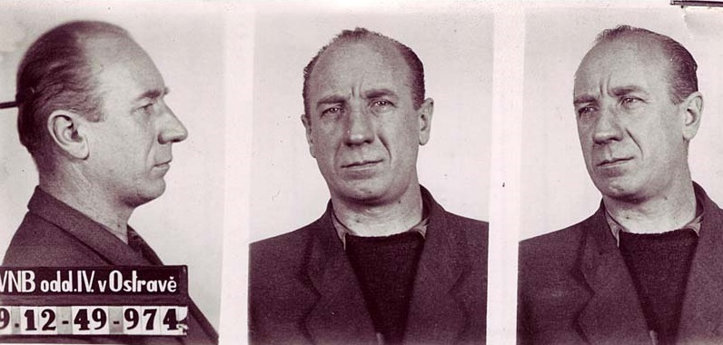 Vazební fotografie Ladislava Ceé (zdroj: ABS).